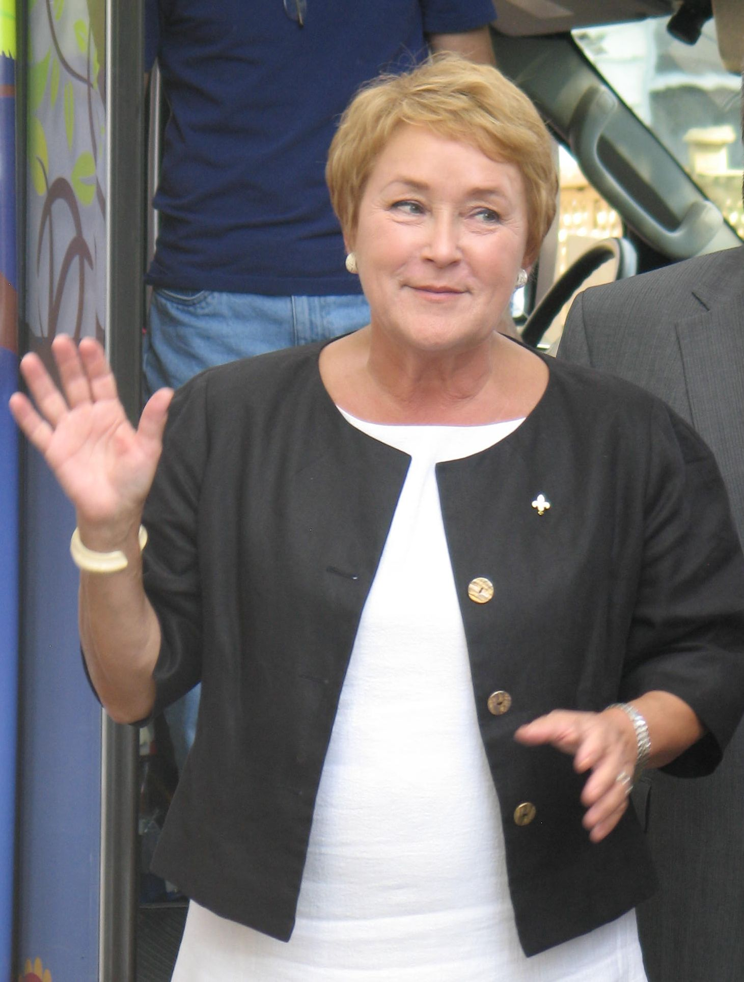 Pauline Marois participe à un événement partisan dans le quartier Limoilou de Québec à la veille de l'élection générale québécoise de 2012.